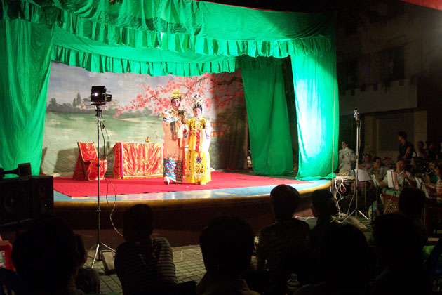 中山市一社区粤剧爱好者的业余演出